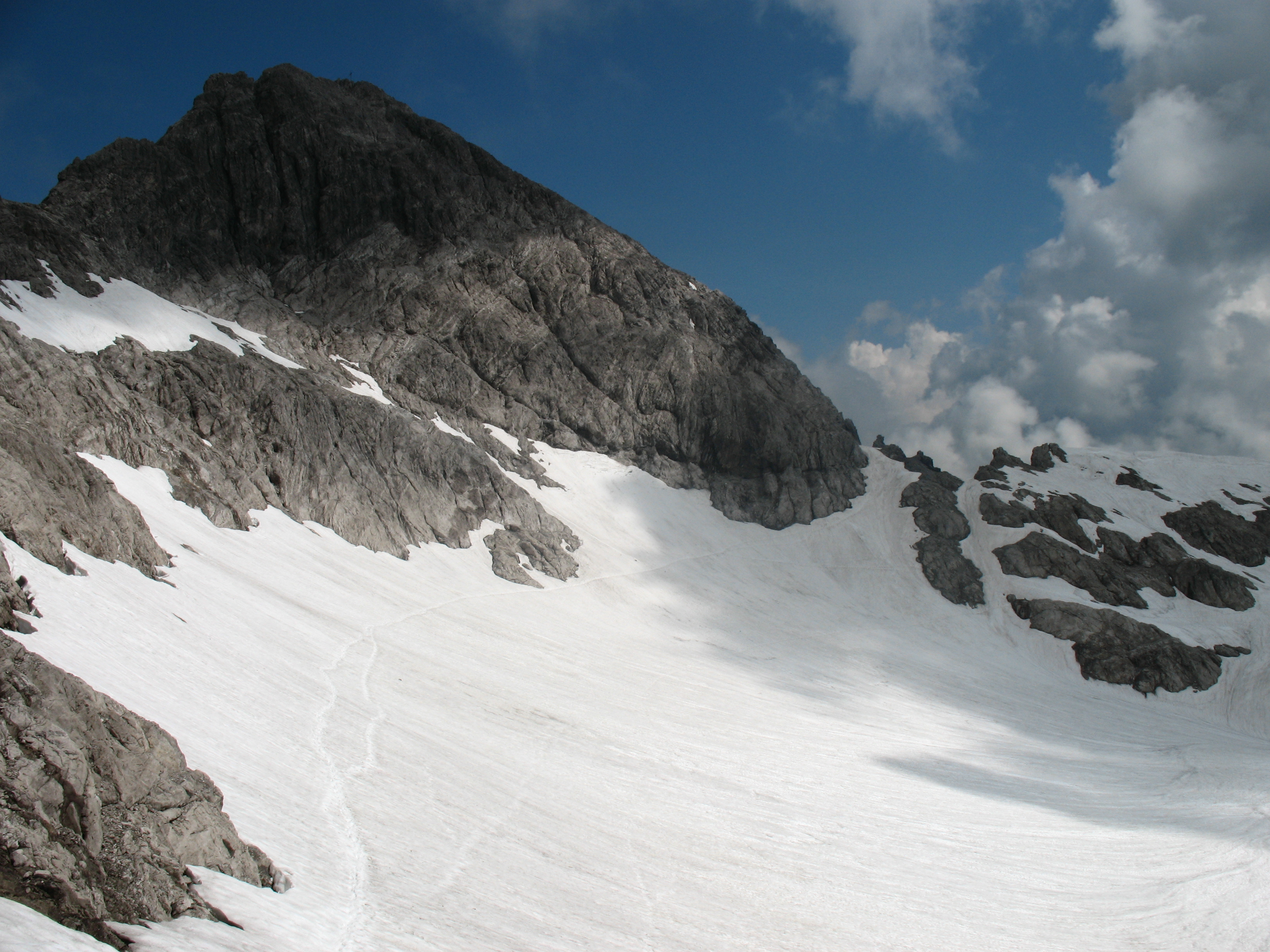 Mädelegabel (2645 m) mit dem Schwarzmilzferner.